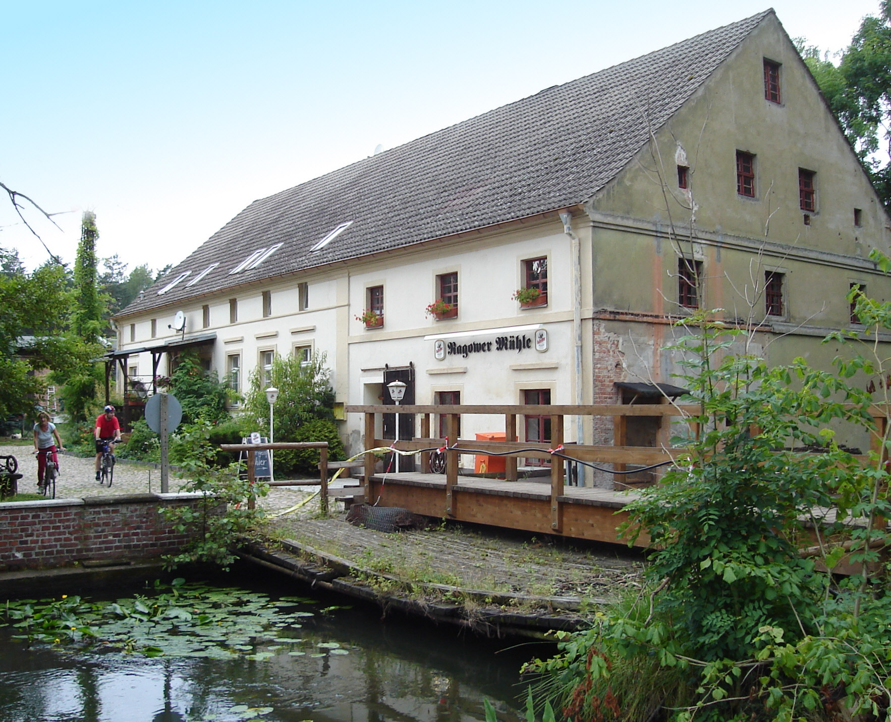 Schlaubetal, Ragower Mühle Source: taken by user on July 7, 2005